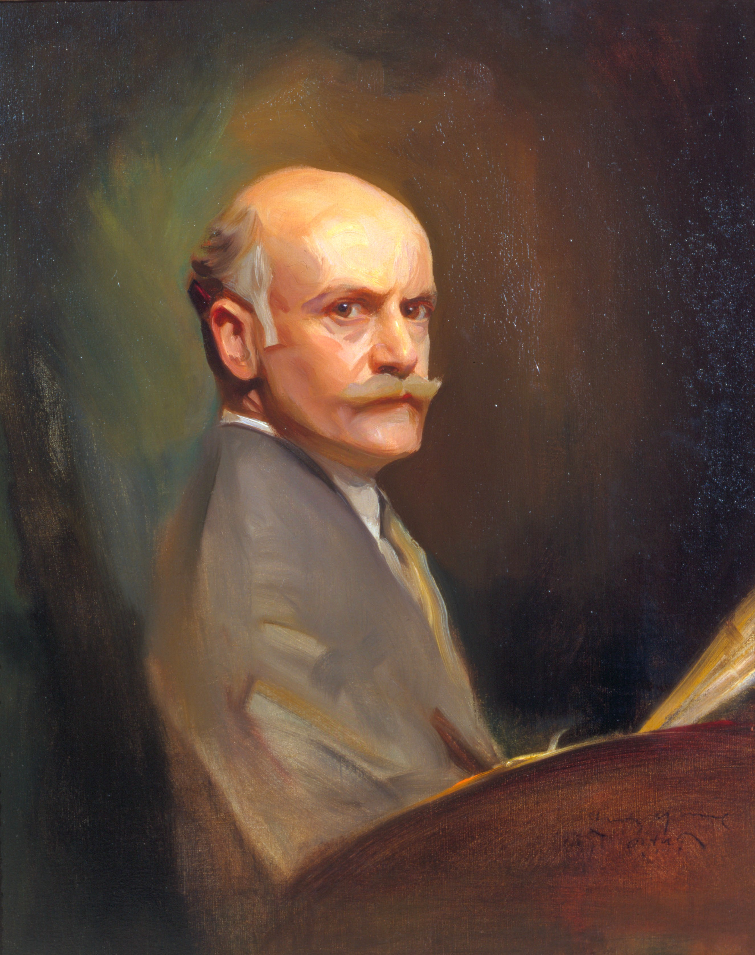 Self-portrait